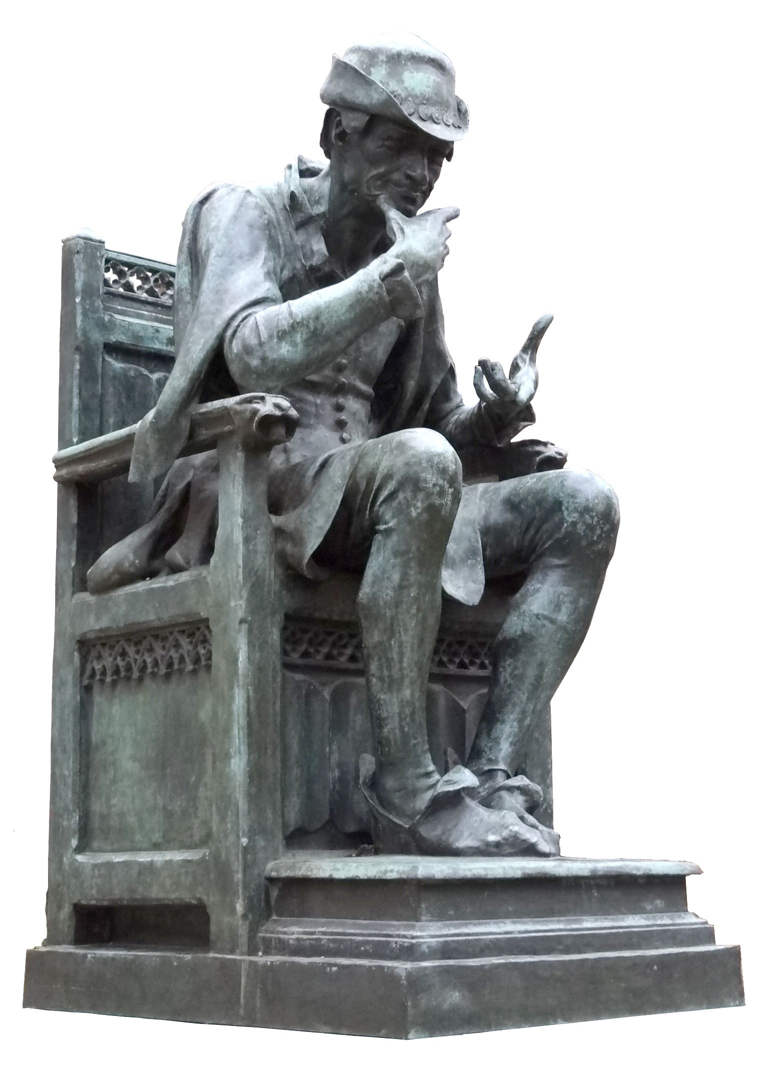 Bronze du roi Louis XI exécuté par Jean Baffier en 1885. Cette statue est visible à Bourges en centre-ville à proximité de la poste.